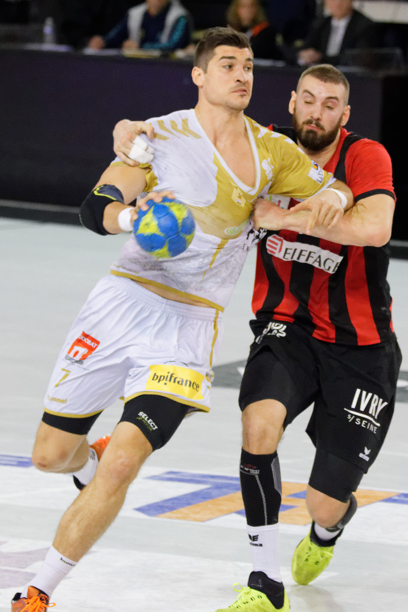 Ivry - Saint-Raphaël lors de la 19e journée du championnat de France de handball masculin le 23 mars 2016 au gymnase Auguste Delaune à Ivry sur Seine.